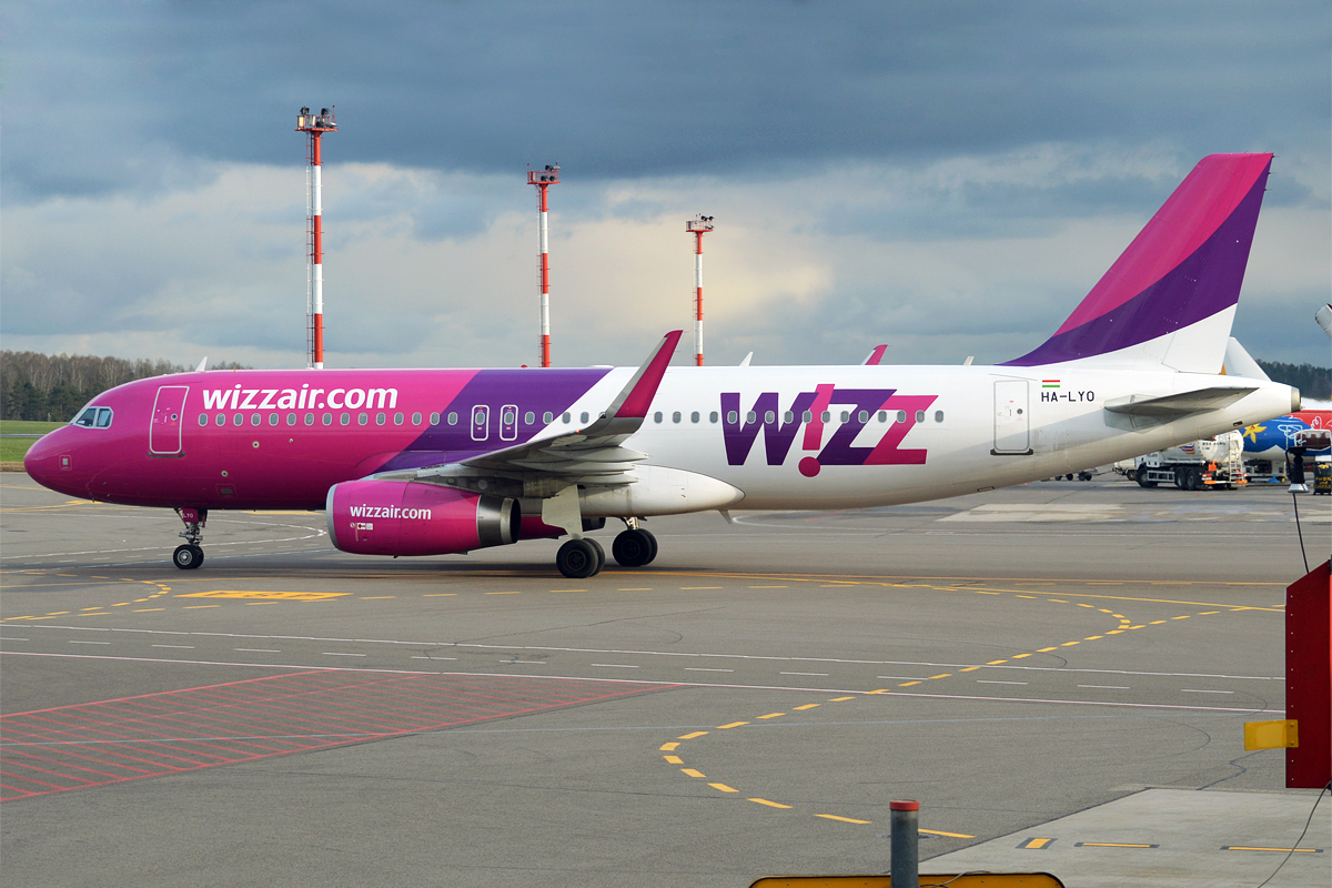 Wizz Air, HA-LYO, Airbus A320-232